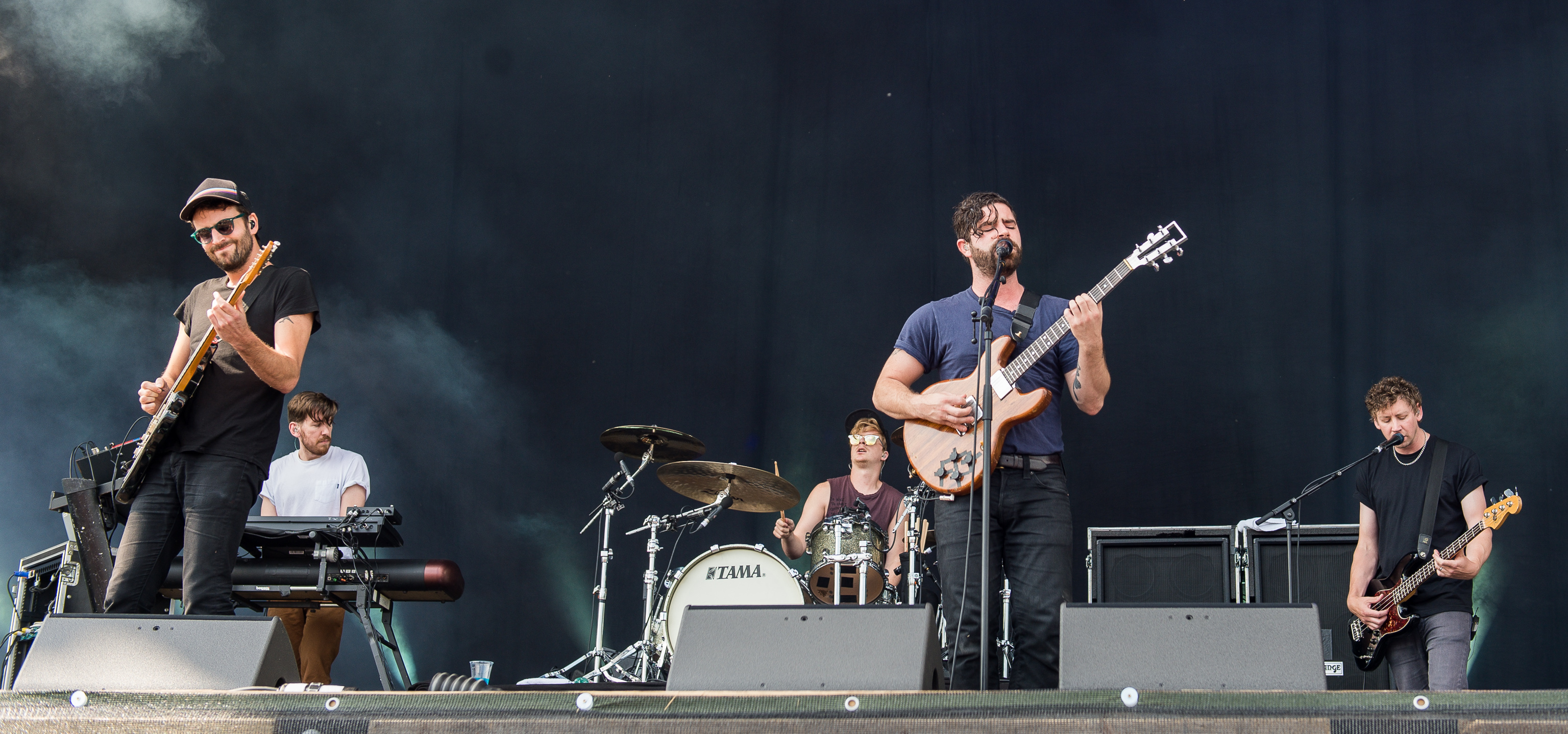 ARGO-Konzerte,Edwin Congreave,Festival,Foals,Jack Bevan,Jimmy Smith,Konzert,Livekonzert,Livemusik,Musik,RiP,Rock im Park 2016,Seat Zeppelin Stage,Walter Gervers,Yannis Philippakis